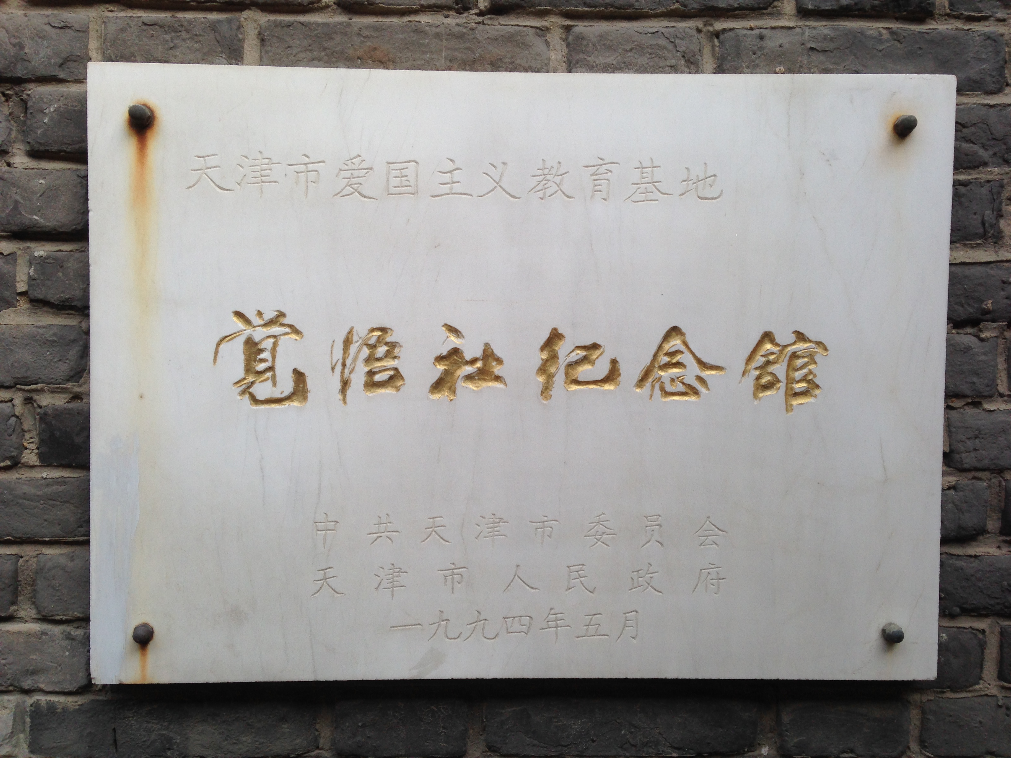 觉悟社旧址市保铭牌